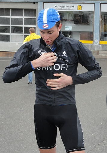 Bilde av Vegard Stake Laengen før start på 4. etapp av Tour of Norway 2012 i Hamar.